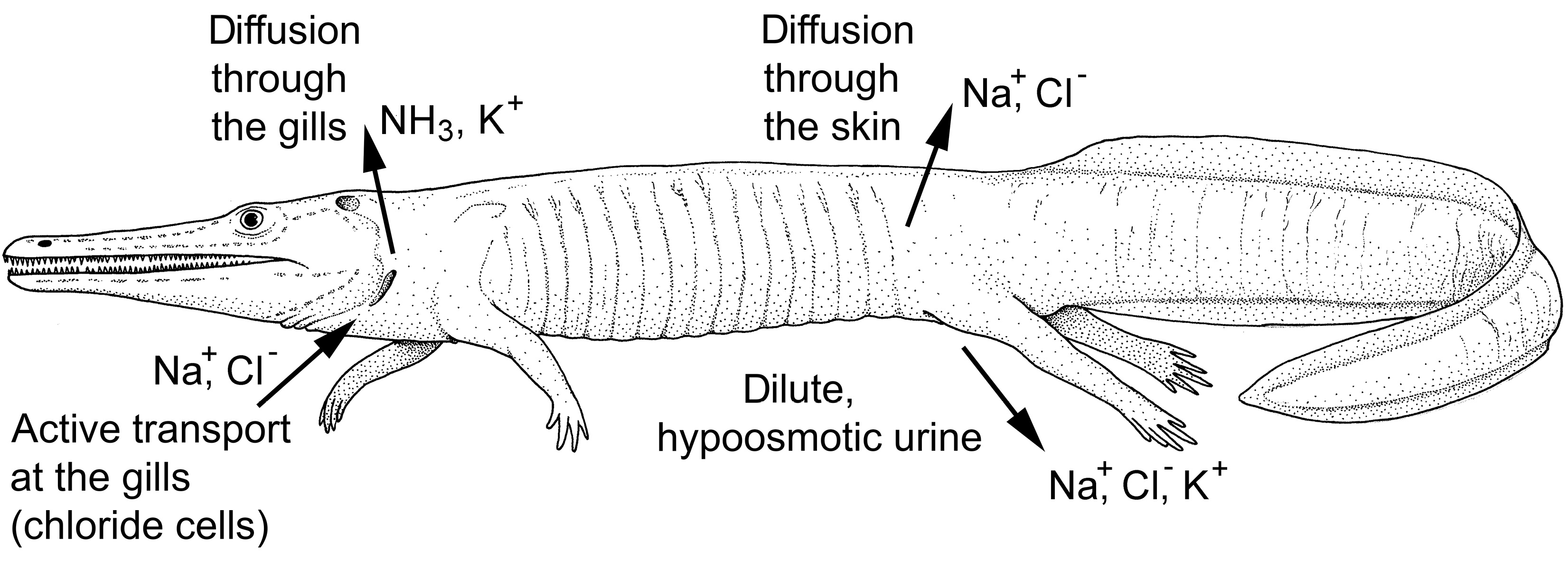 Solute balance of the Archegosaurus model. Because Archegosaurus was probably hyperosmotic and hyperionic to its environment, it lost ions by diffusion through the gills similar to freshwater fishes. It can be assumed that specialized chloride cells were present in the gills that actively took up ions (mainly NaC and Cl􀀀/ from the ambient water to retain a constant osmolarity of the body fluids.